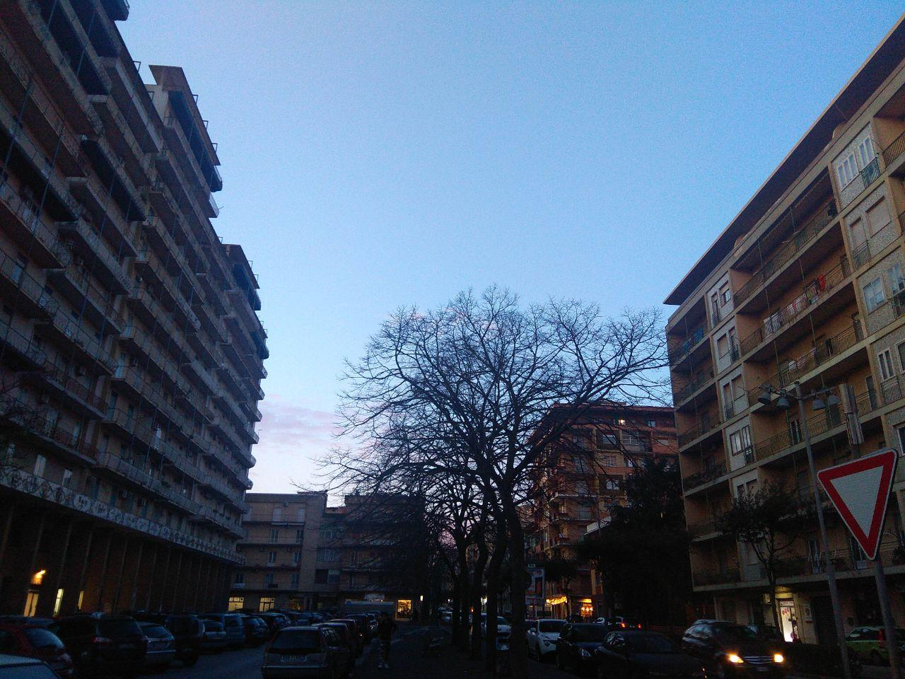 Piazza Bellini Caltagirone (CT)